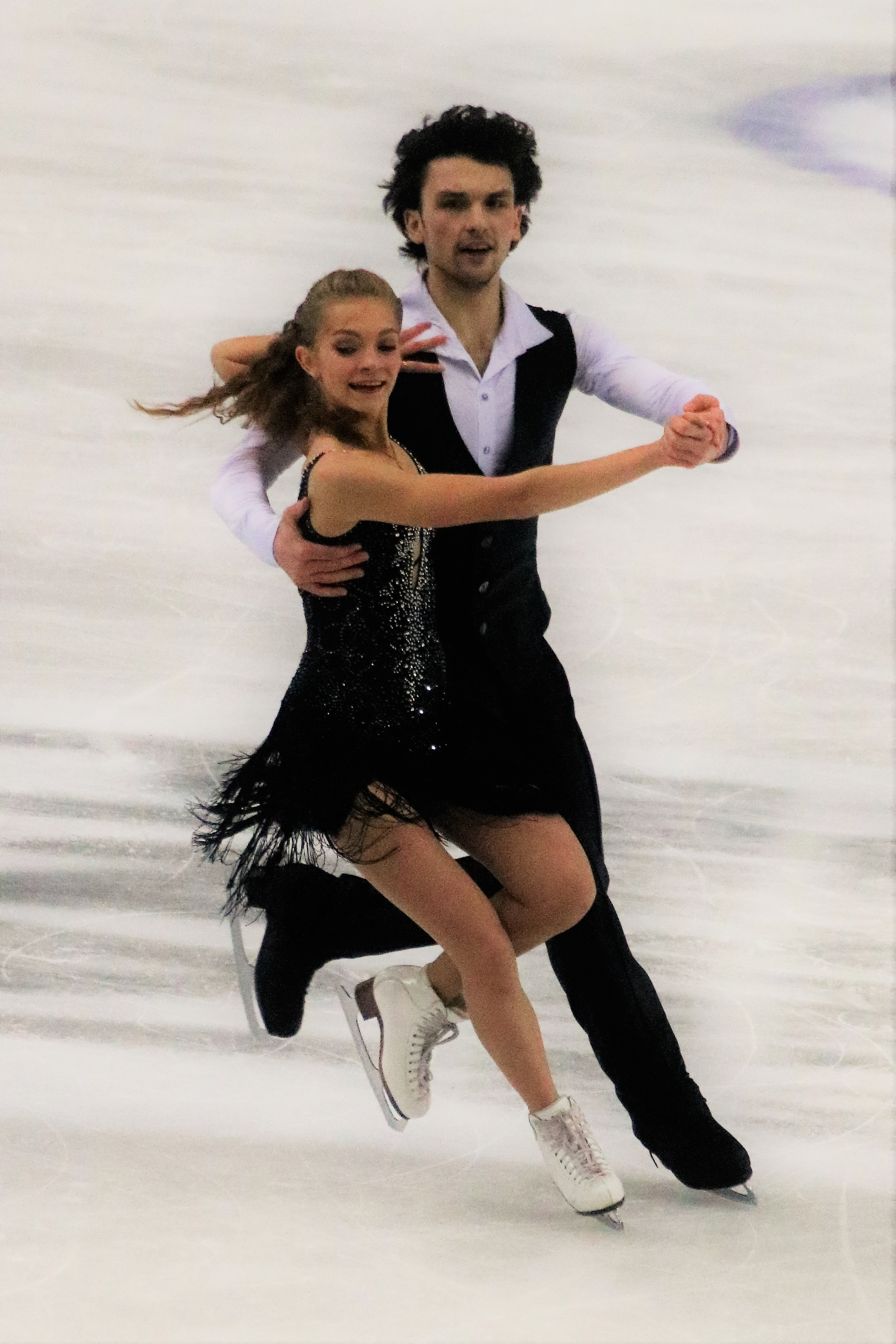 Мария Казакова / Георгий Ревия (Грузия) на финале юниорского Гран-при 2019-2020